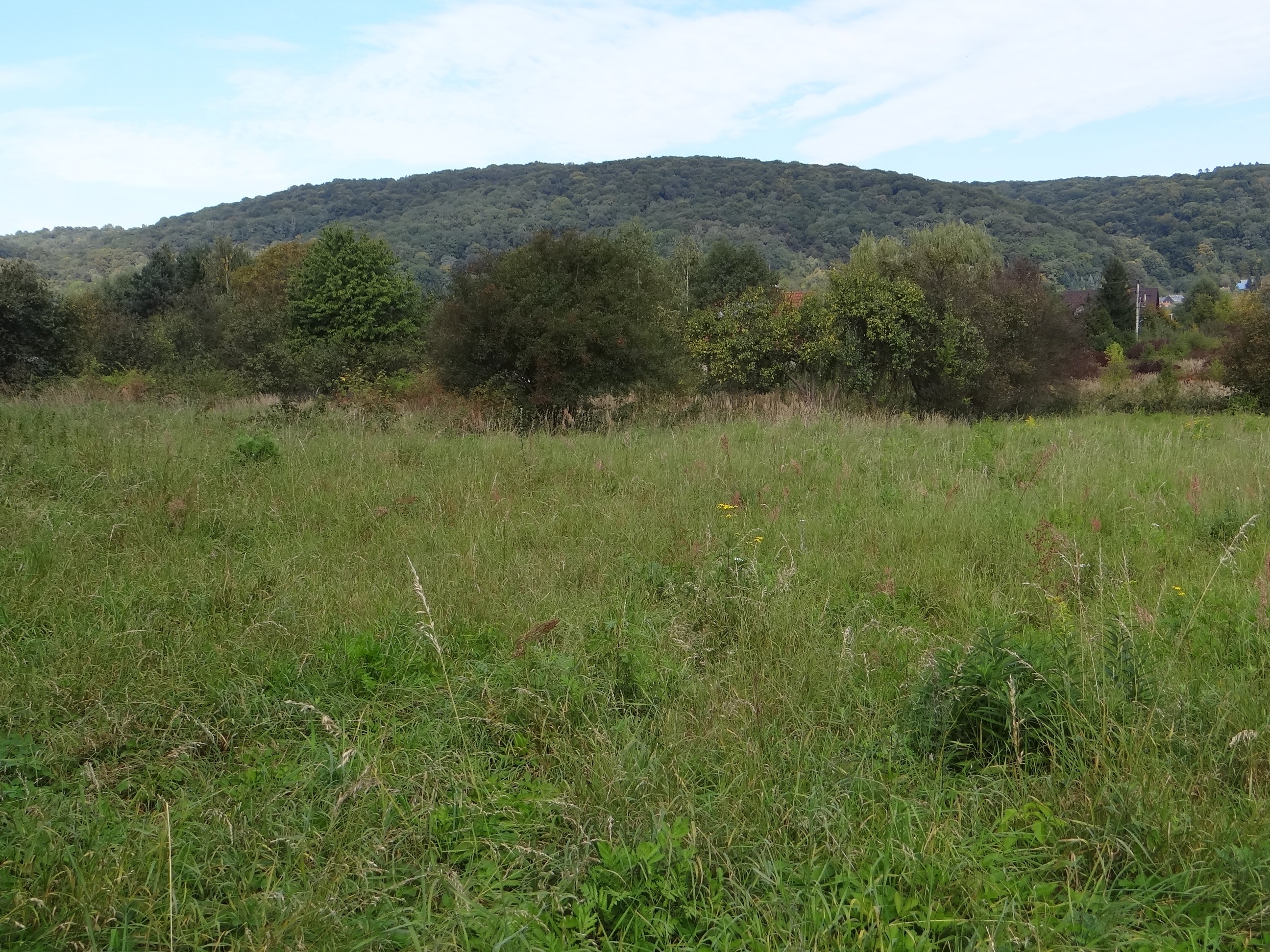 Widok na Wzgórza Lasu Wolskiego z Solnika